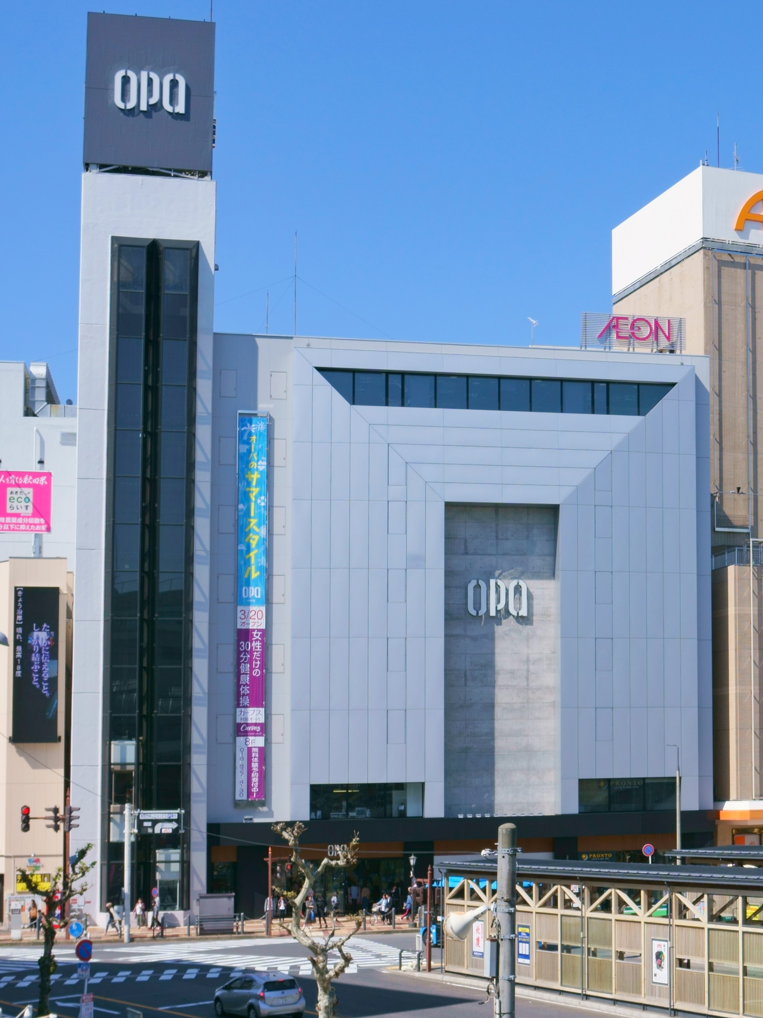 秋田フォーラスを改装して2017年秋にリニューアルオープンした商業施設、秋田OPA（オーパ） Sony ILCE-6300